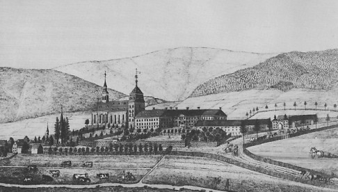 "Nordwestliche Ansicht von der ehemaligen Benedictiner Abtej Graffschaft", heute Kloster Grafschaft (Germany)